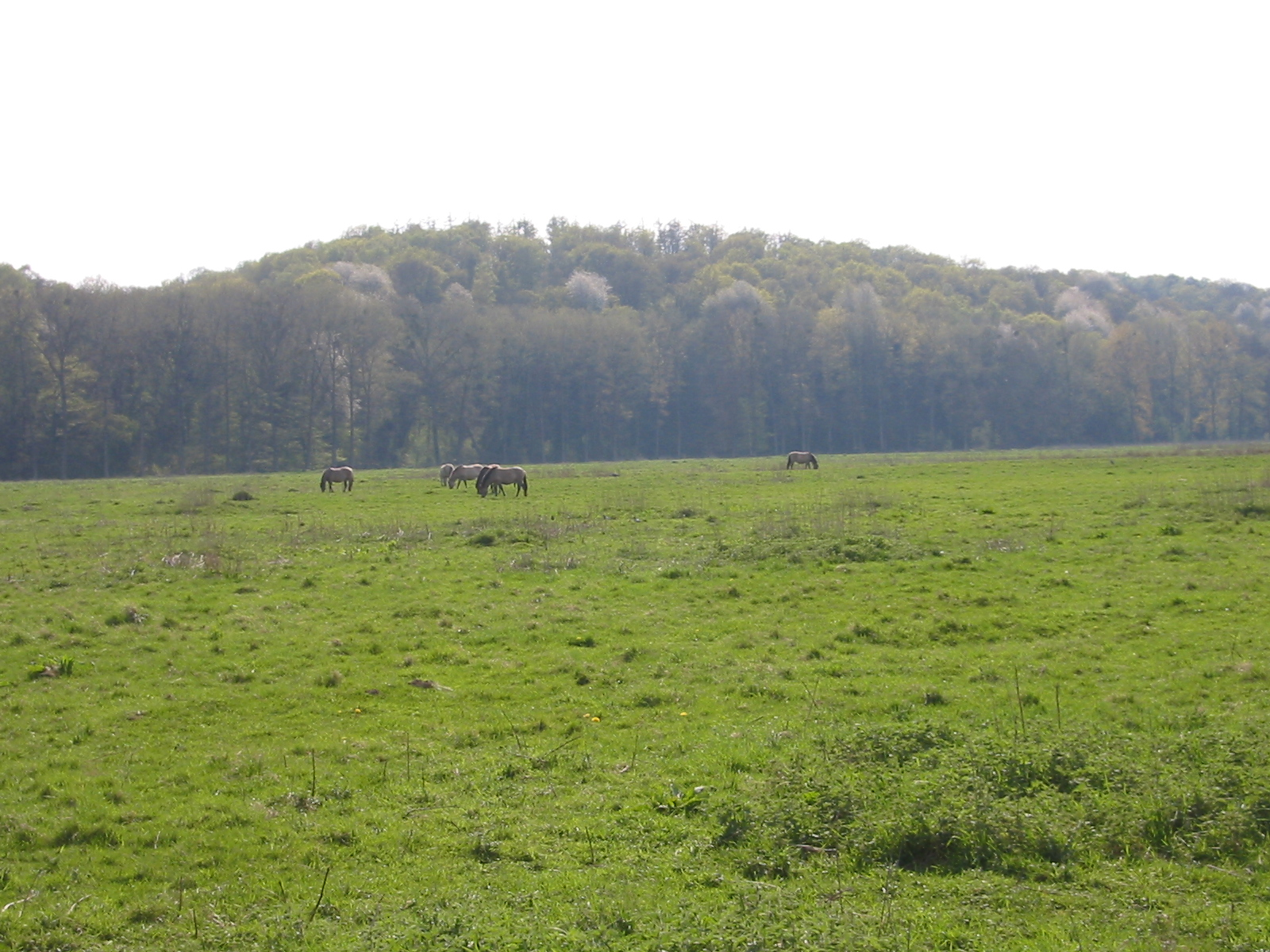 Eigen foto. GerardM 10 mei 2004 22:28 (CEST) Ingendael met koniks